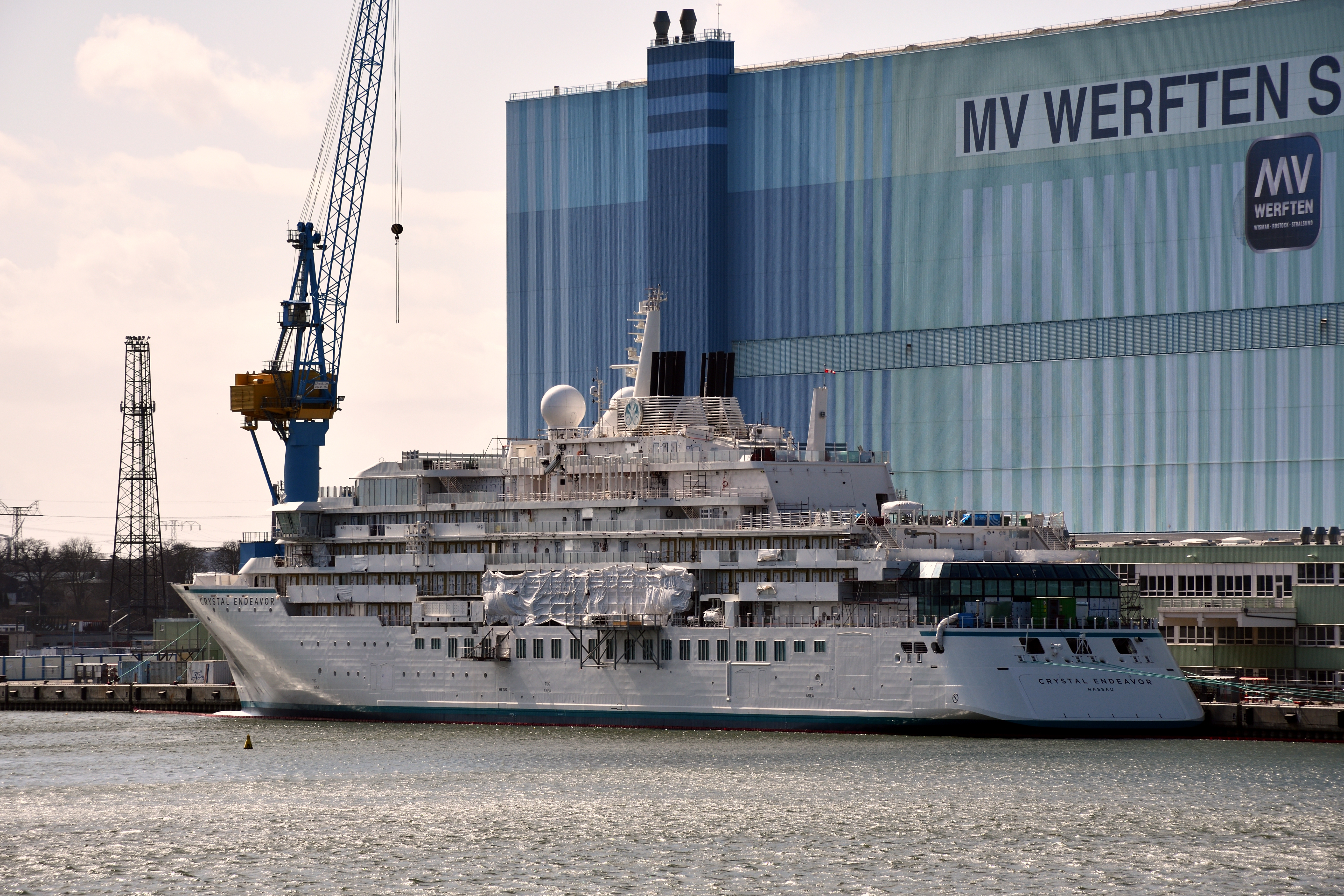 Das Schiff "Crystal Endeavor" vor der Werfthalle der MV Werften Stralsund, 03.04.2020